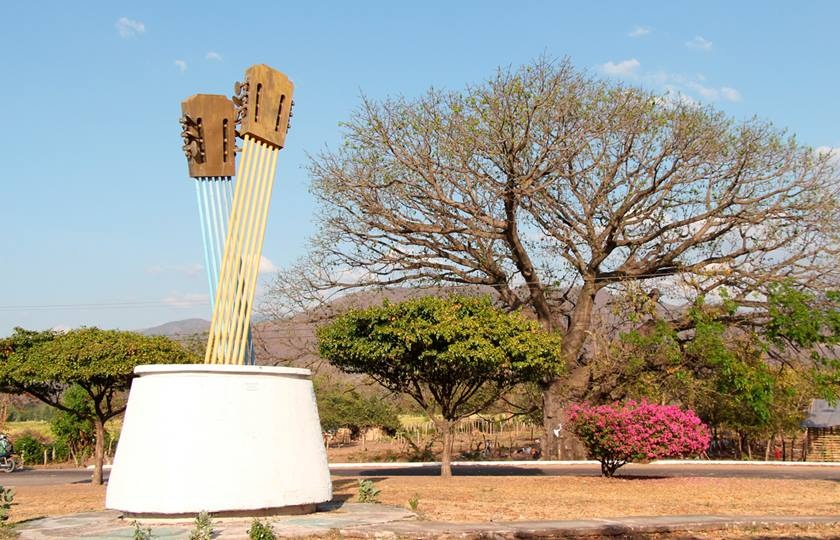 Monumento a Las Guitarras